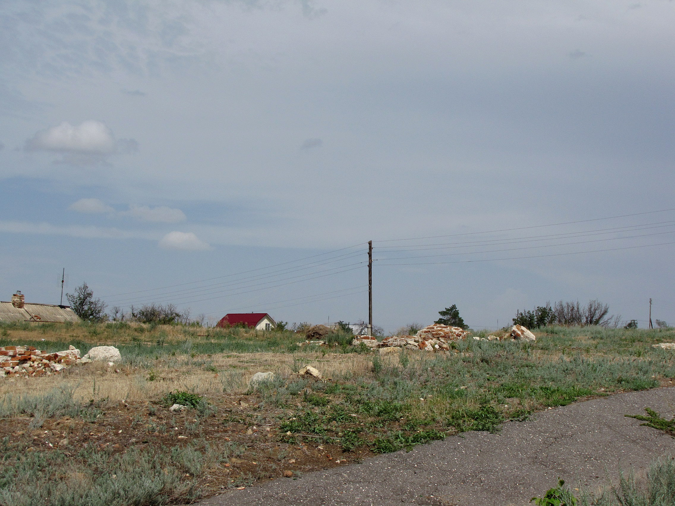 Всё, что сегодня осатлось от Успенской церкви